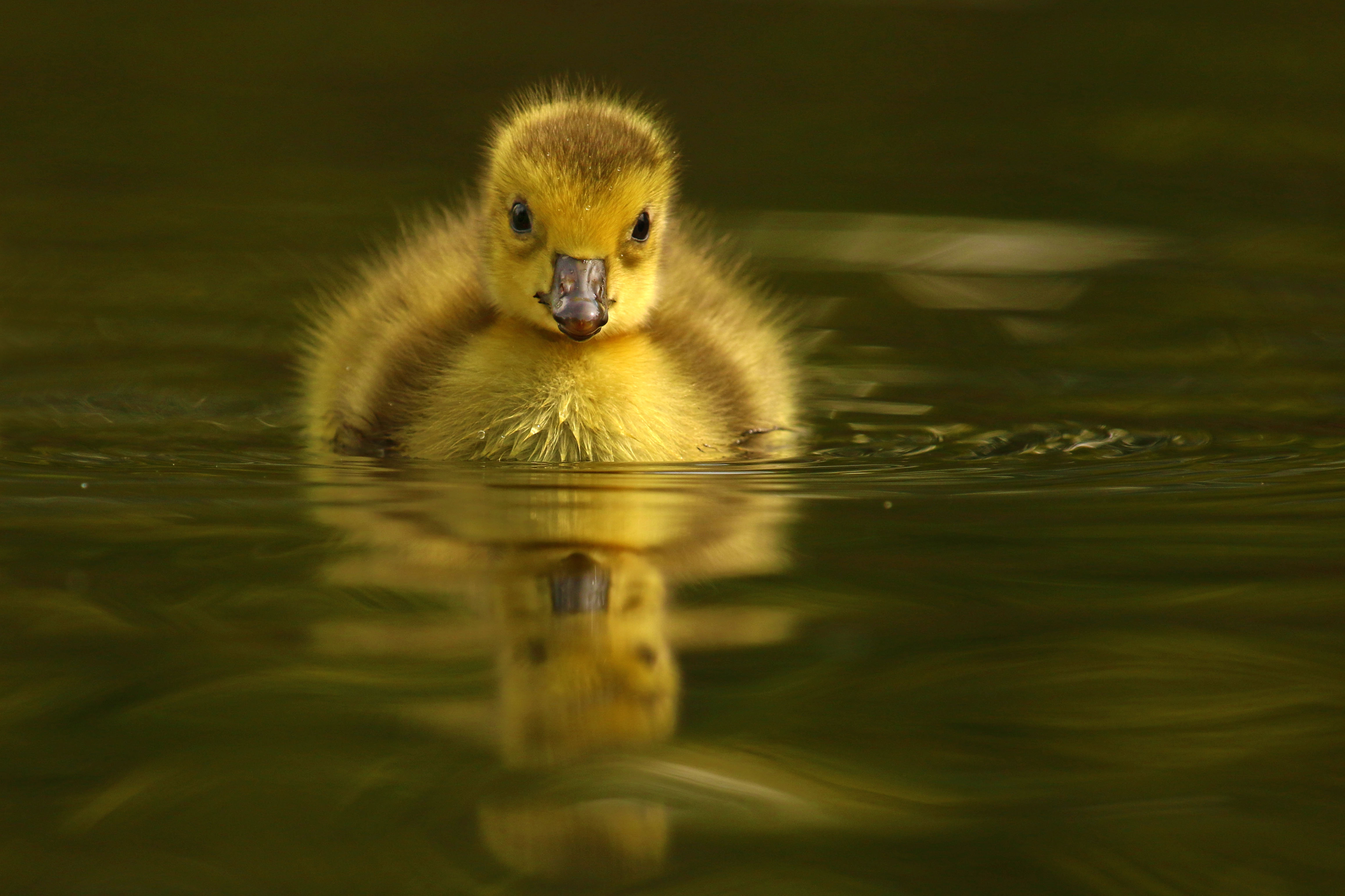 Im Düsseldorfer Südpark gibt es einige kleine Seen, unter anderem den Deichsee, auf dem sich die kleinen Kanadagänse besonders wohl fühlen